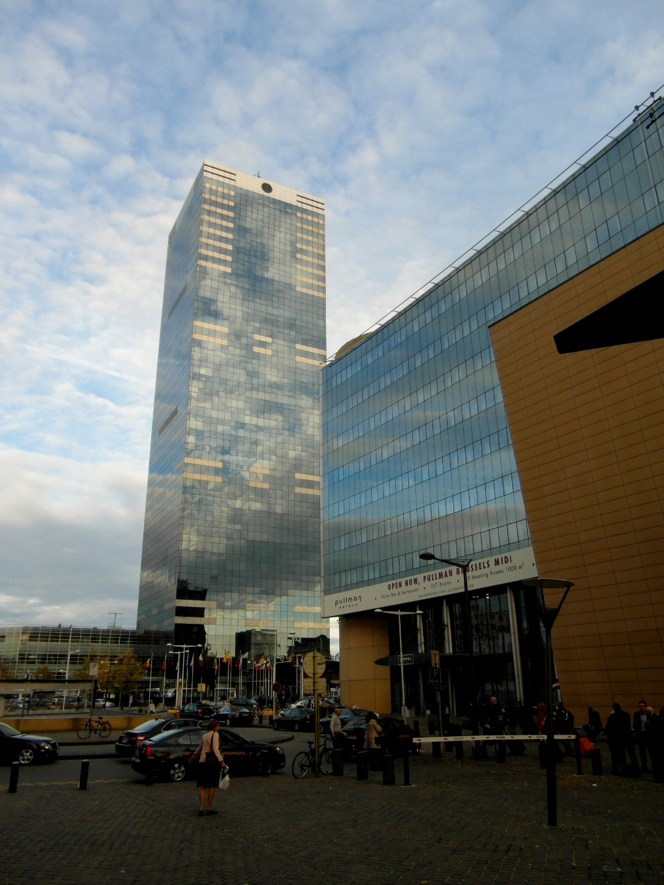 Brüssel Südbahnhof